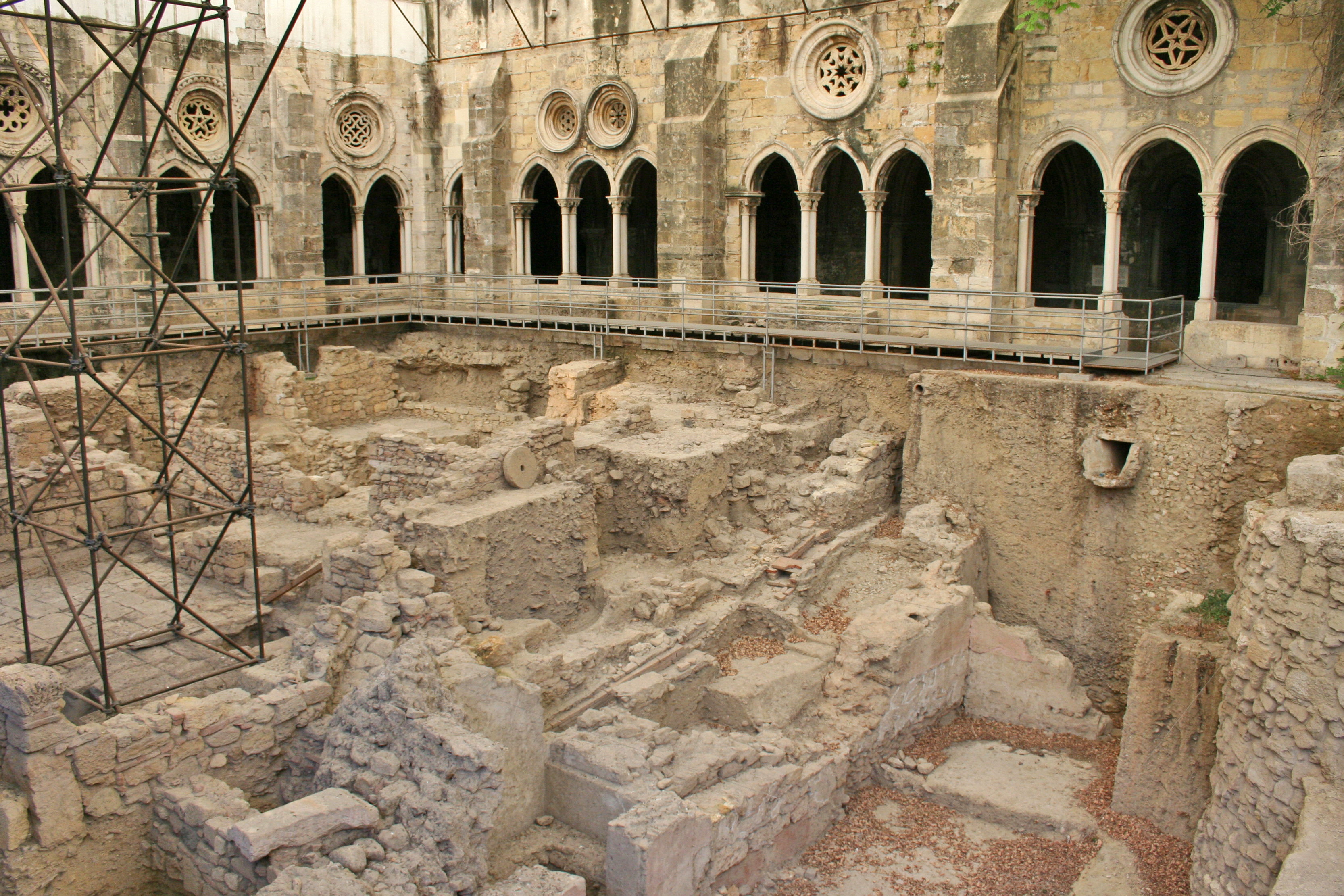 Sé de Lisboa, Sé-Catedral de Lisboa